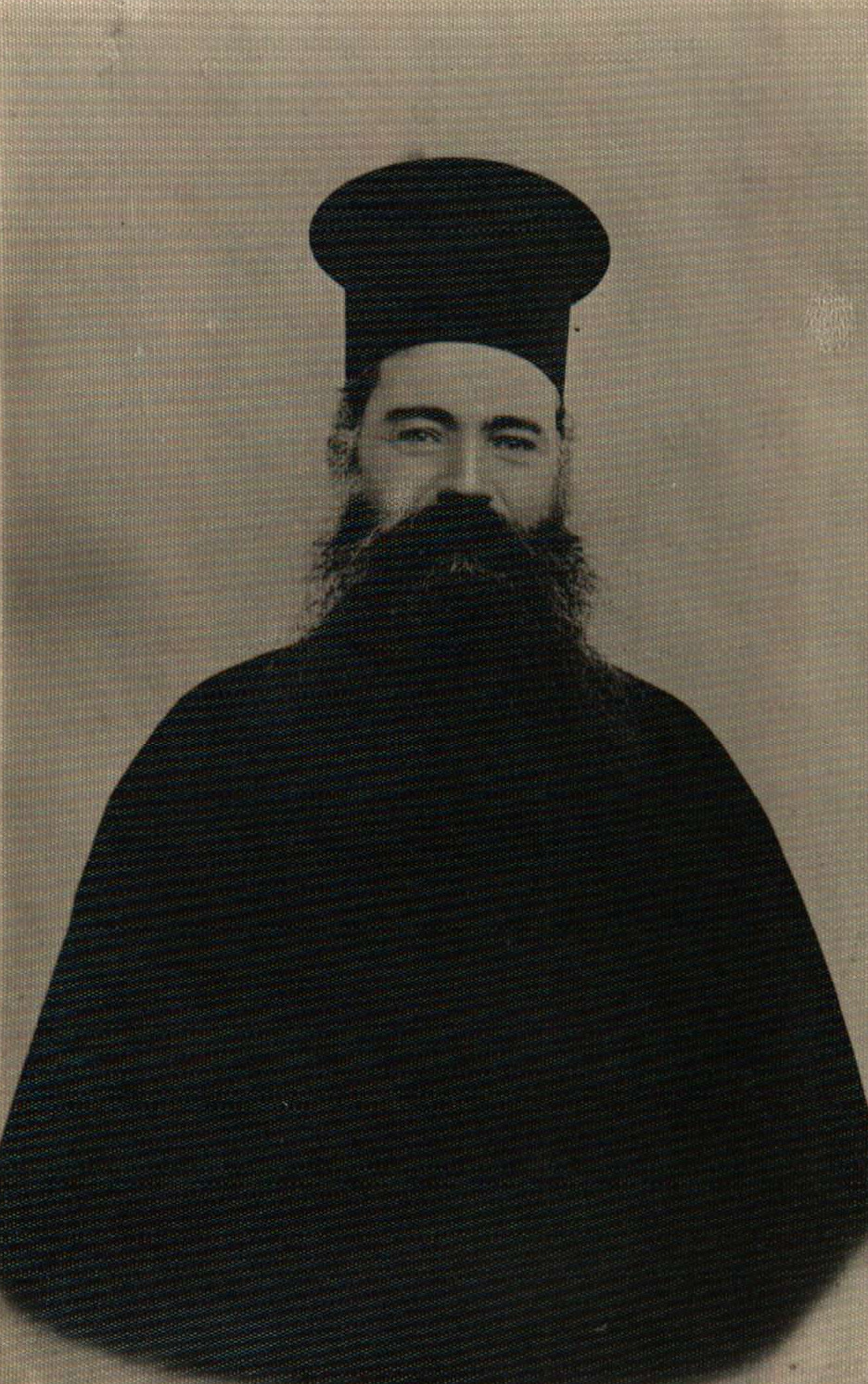 Снимка на иконом Николай Маринов Шкутов, на 43 годишна възраст.